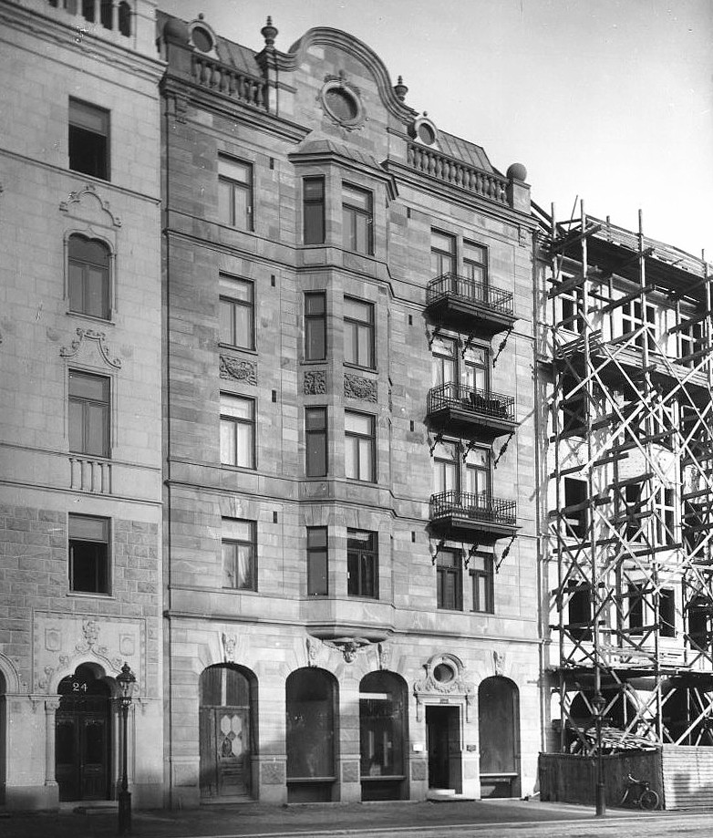 Birger Jarlsgatan 22, grannhuset (Daneliuska huset) är just under uppförand